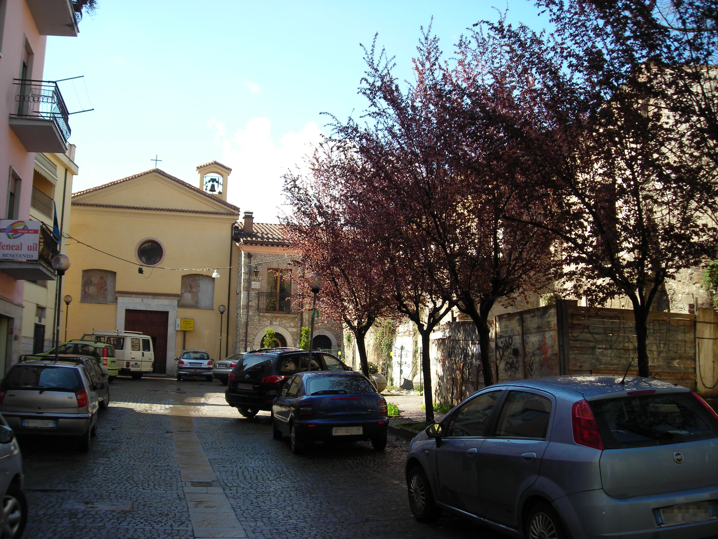 Chiesa di San Donato, Benevento.